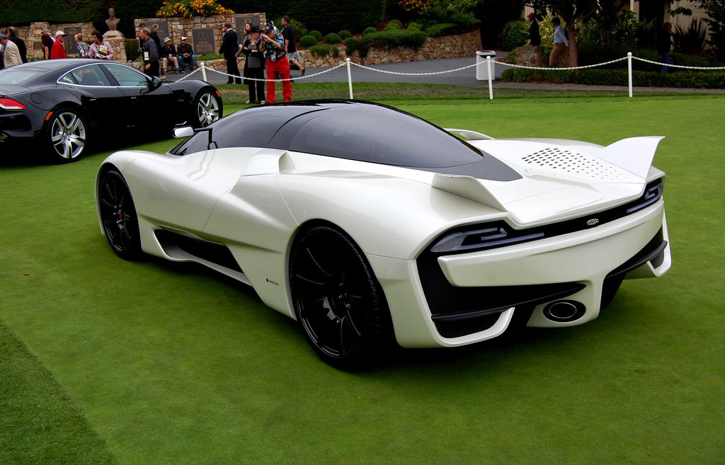 SSC Tuatara.